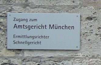 Schild am Haupteingang zum Polizeipräsidium München, Ettstr. 2-4: Zugang zum Amtsgericht München Ermittlungsrichter Schnellgericht